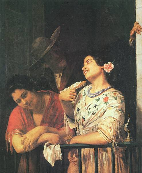 Urheber: Mary Cassatt, Auf einem Balkon während des Karnevals. Philadelphia Museum of Art, Year of painting?